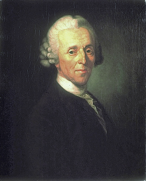 Replik; Bildnis des Dichters Christian Fürchtegott Gellert (1715-1769)